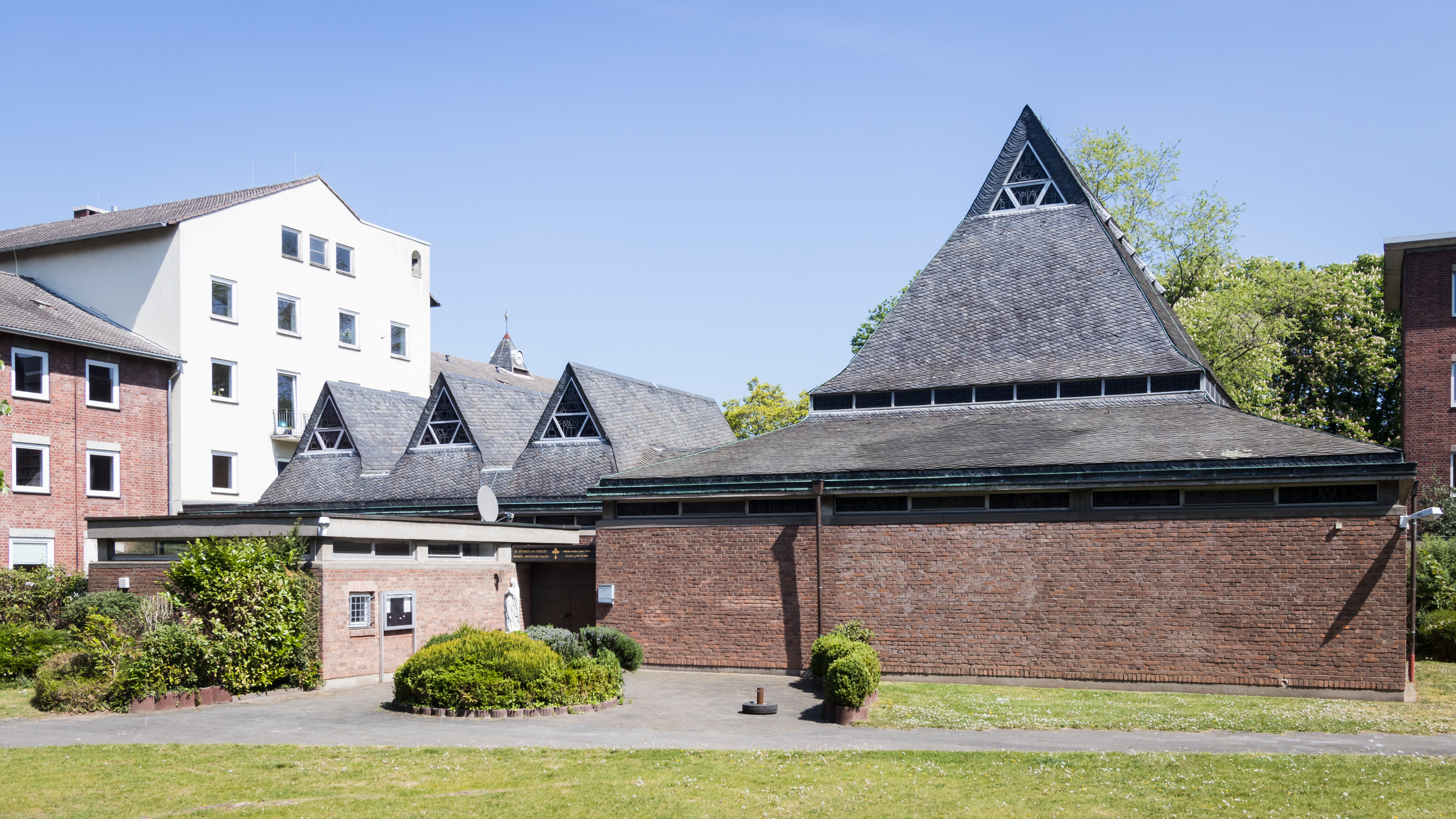 Kirche St. Petrus und Paulus, ursprünglich Klosterkirche Vom Guten Hirten, Köln-Lindenthal; Architekt: Fritz Schaller